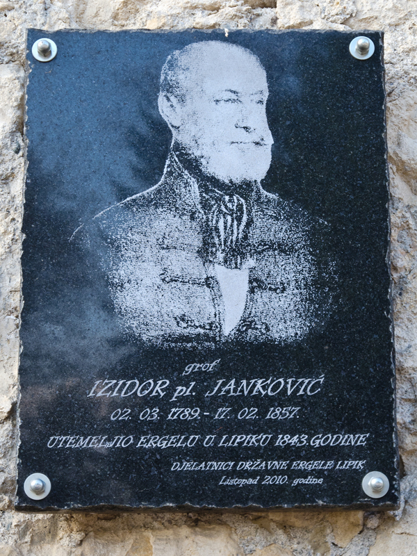 Lipik